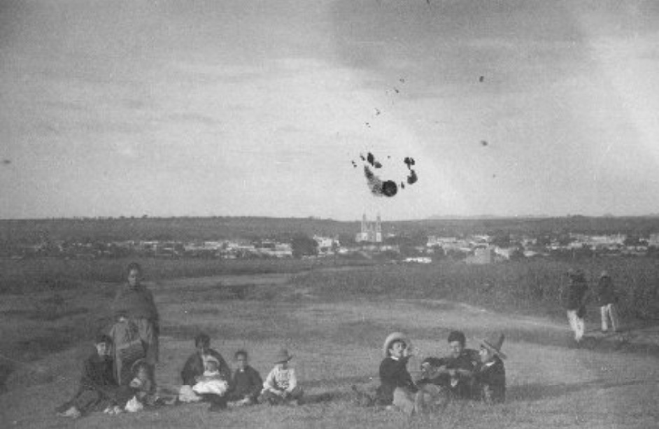 I.O. "110. Panorama de Dolores Hidalgo" Lugarː Dolores Hidalgo, Guanajuato, México Fechaː Ca. 1890 Ubicaciónː Fototeca Nacional